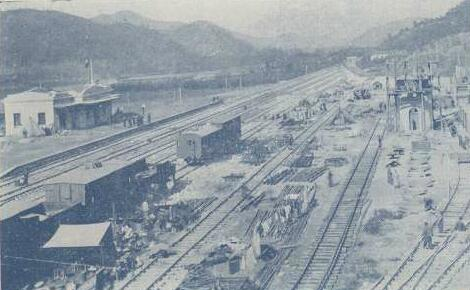 铁展 1934-1 粤汉铁路株韶段李家寨站